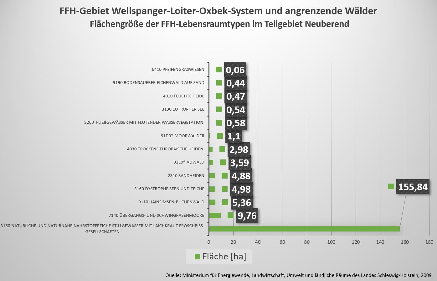 Lebensraumtypen im Teilgebiet Neuberend